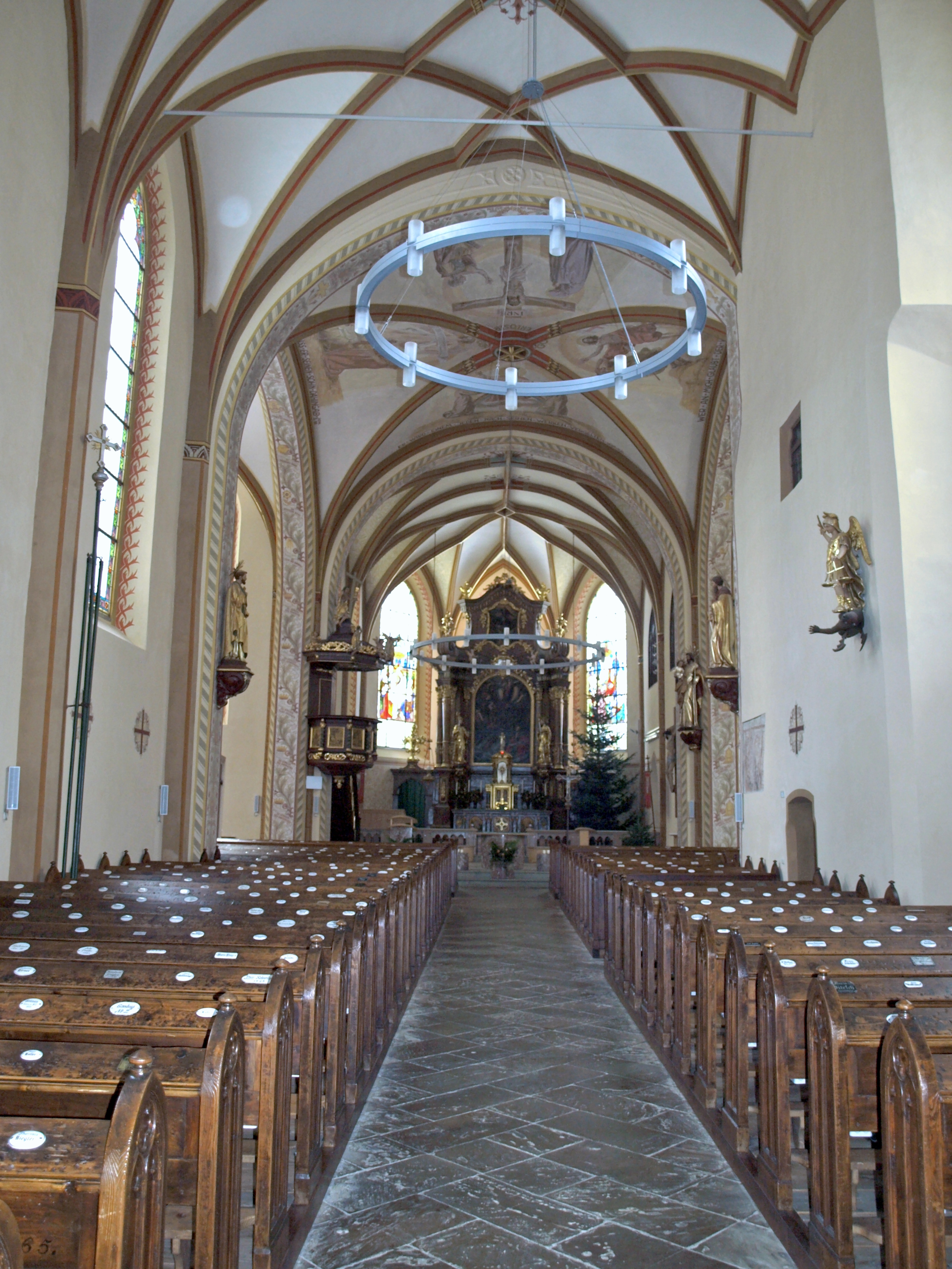 Kath. Pfarrkirche hl. Johannes Evangelista